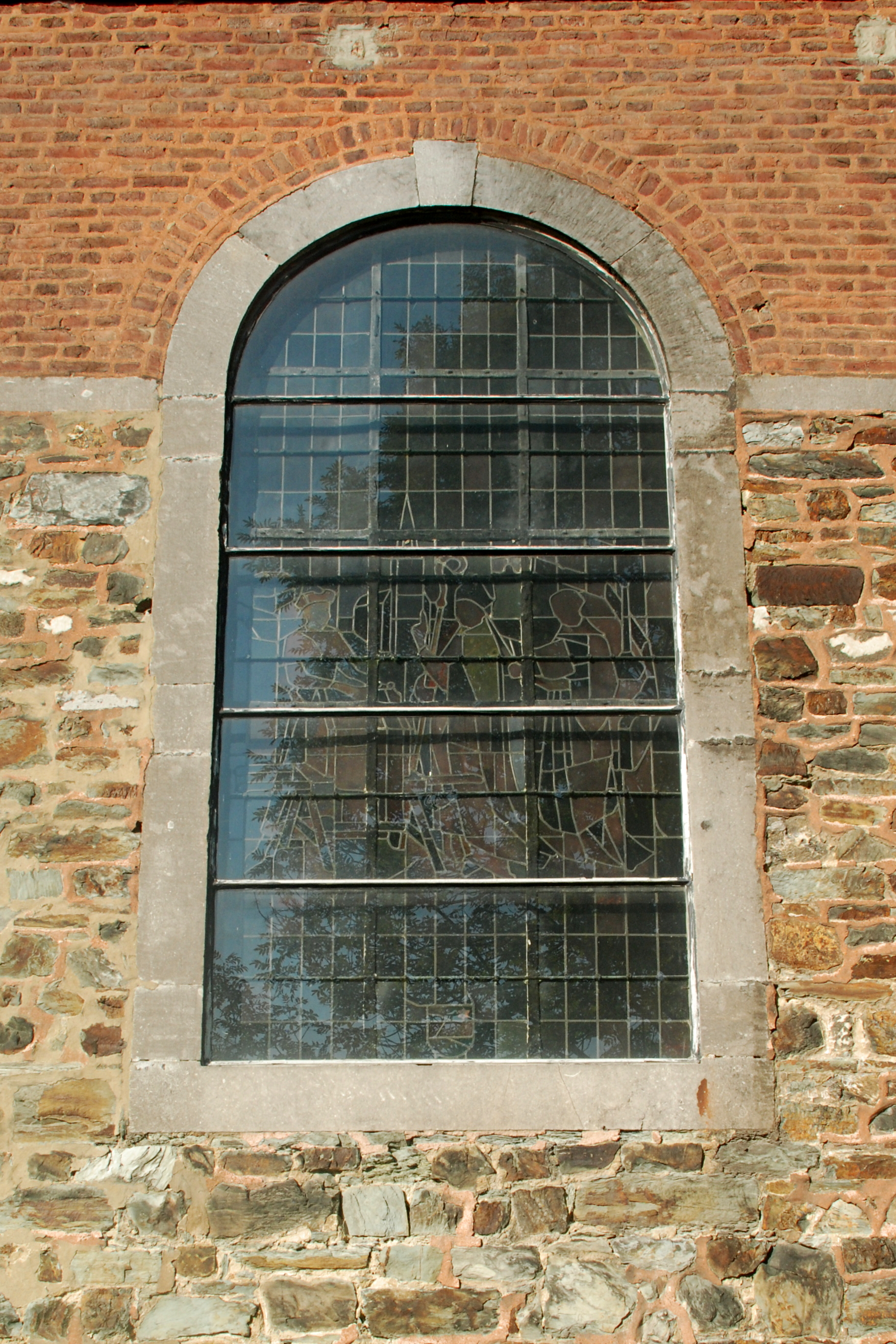 Belgique - Brabant wallon - Mont-Saint-Guibert - Église Saint-Guibert